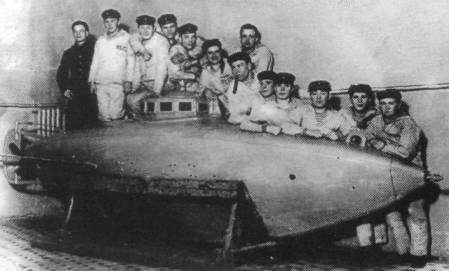 Фото подводной лодки Джевецкого в водолазном классе Источник: Автор: Неизвестен Датировка: 1890-е гг.